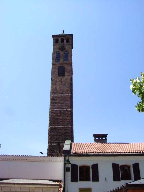 Sahat kula, Sarajevo